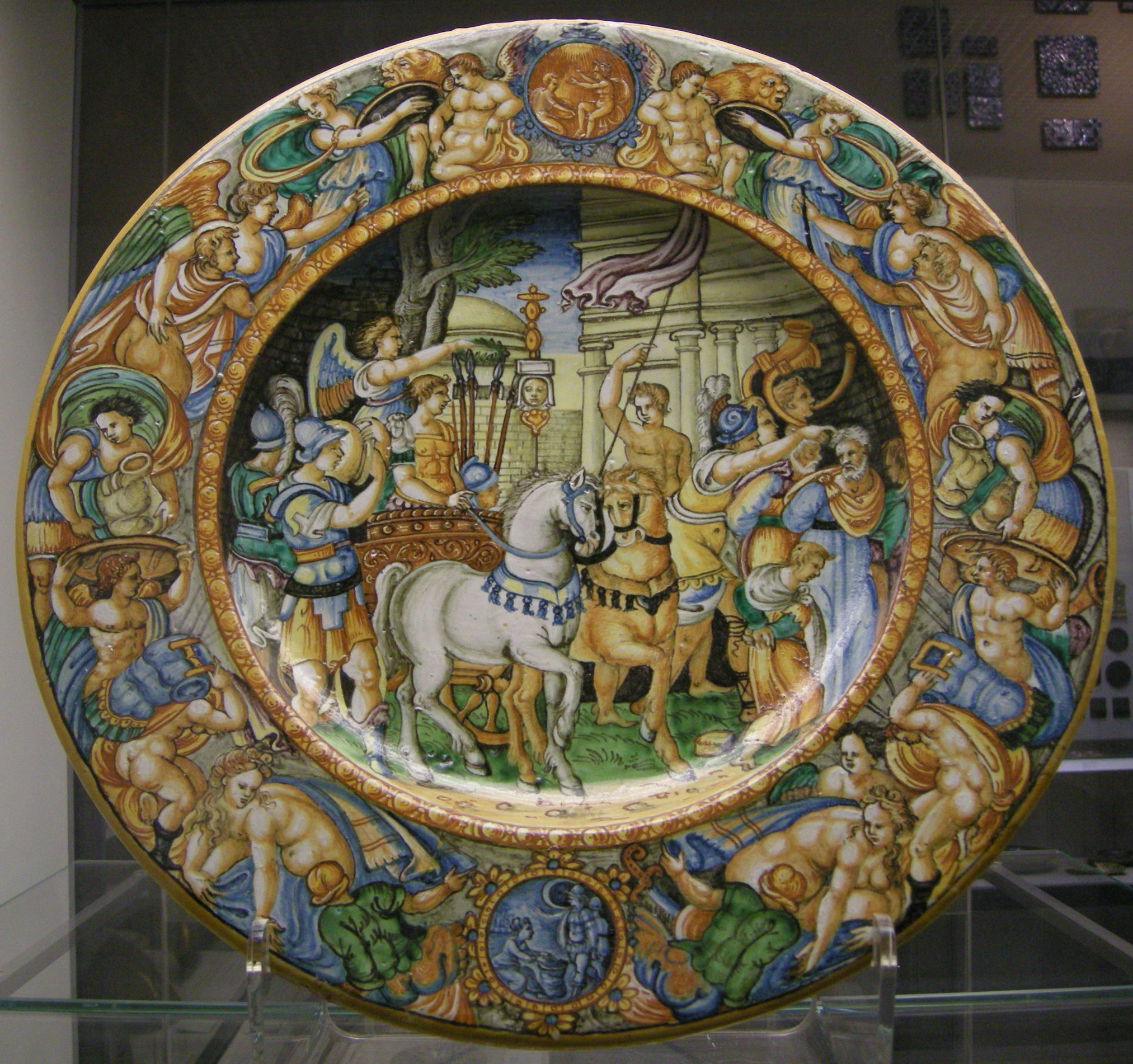 Maiolica di nevers, trionfo di cesare in roma, 1600-1630 circa